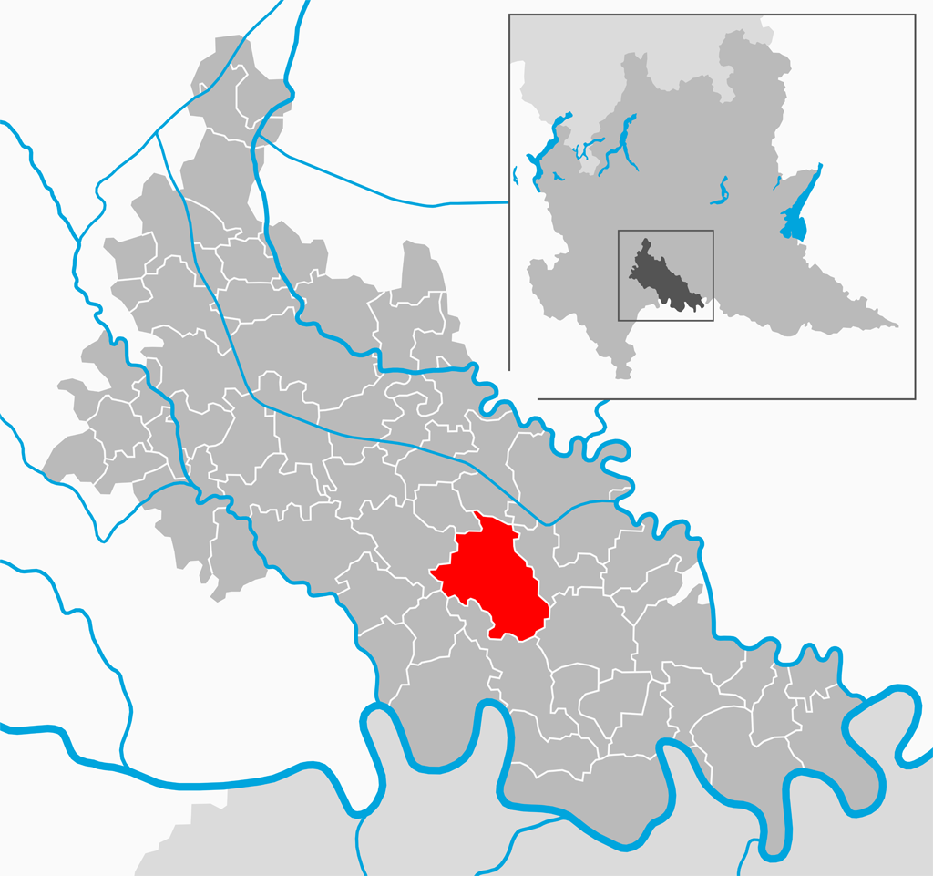 Il comune di Casalpusterlengo nella provincia di Lodi